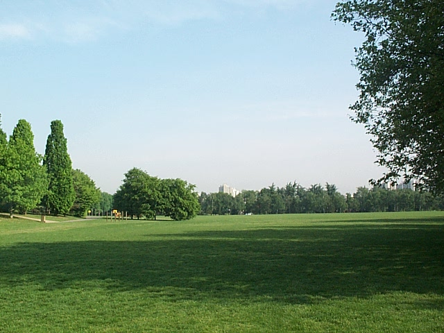 Vue d'une partie du parc de Créteil situé aux abords du lac Photo personnelle : (Sebfun) prise le 12 mai 2006 Catégorie:Créteil